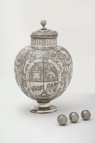 Urna de la Mesta (Barroco). Número de inventario: 2002-57-1.